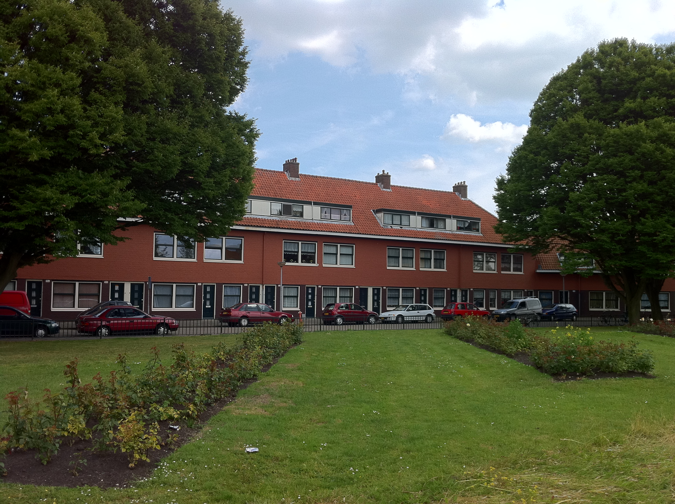 Kamperfoelieweg Amsterdam-Noord, woningen gebouwd door Zomers Buiten, nu eigendom van Ymere